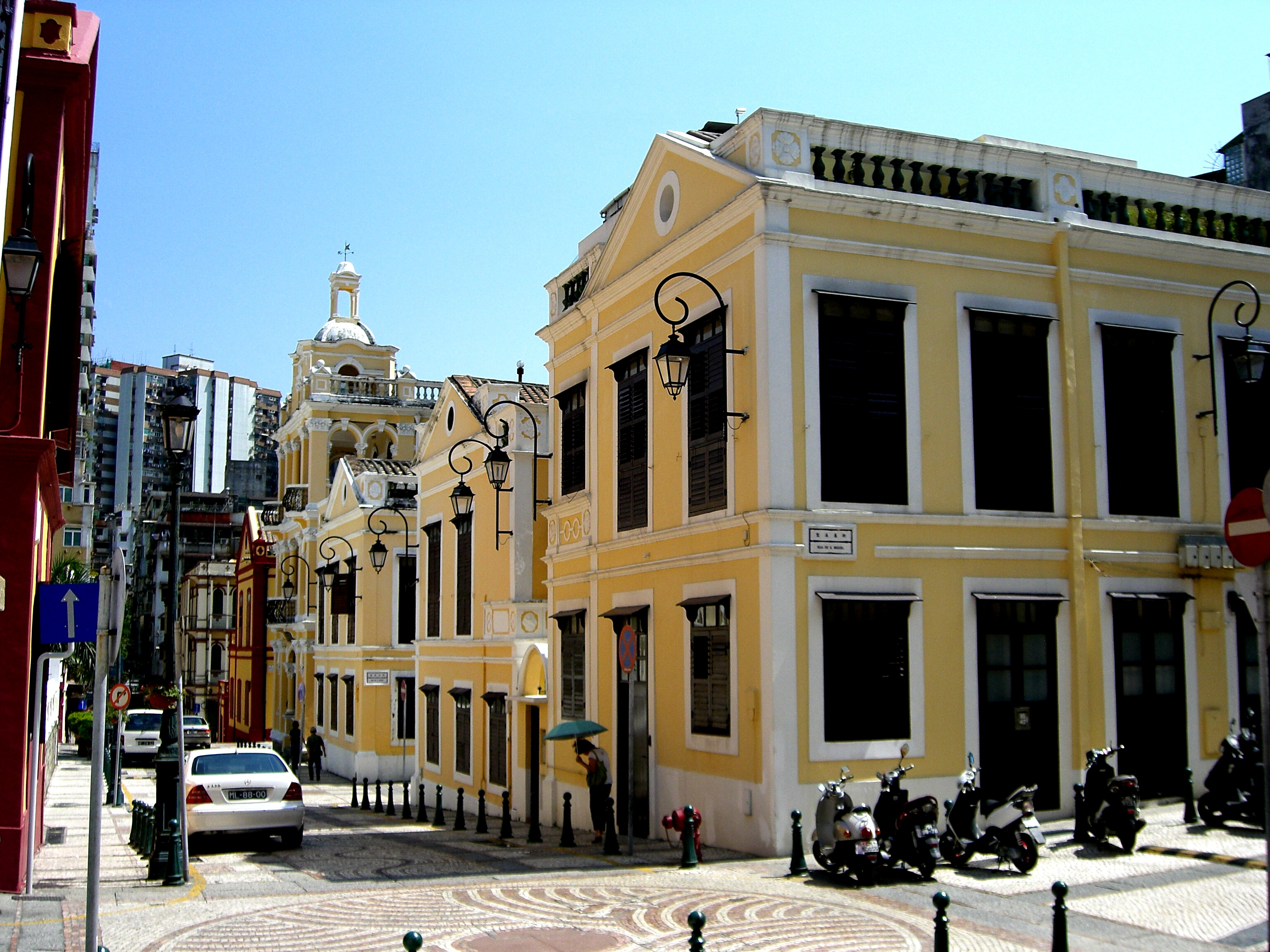 Calçada da Igreja de S. Lázaro